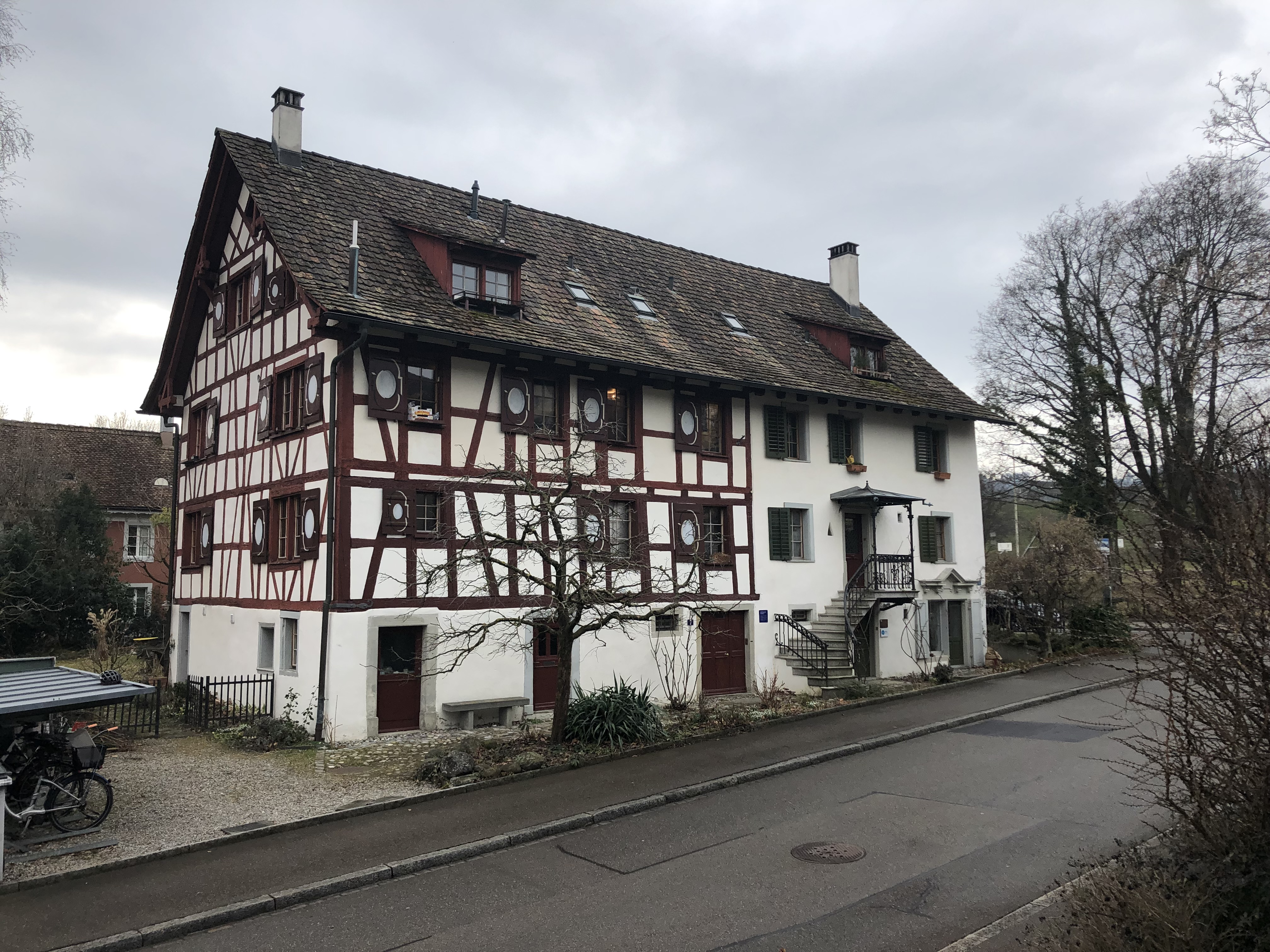 Geburtshaus von Walter Alvares Keller am Hoffnungsweg 7 in Zürich-Wollishofen